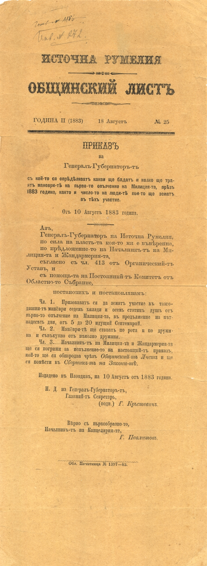 Заповед на генерал-губернатора на Източна Румелия Гаврил Кръстевич от 18 август 1883.